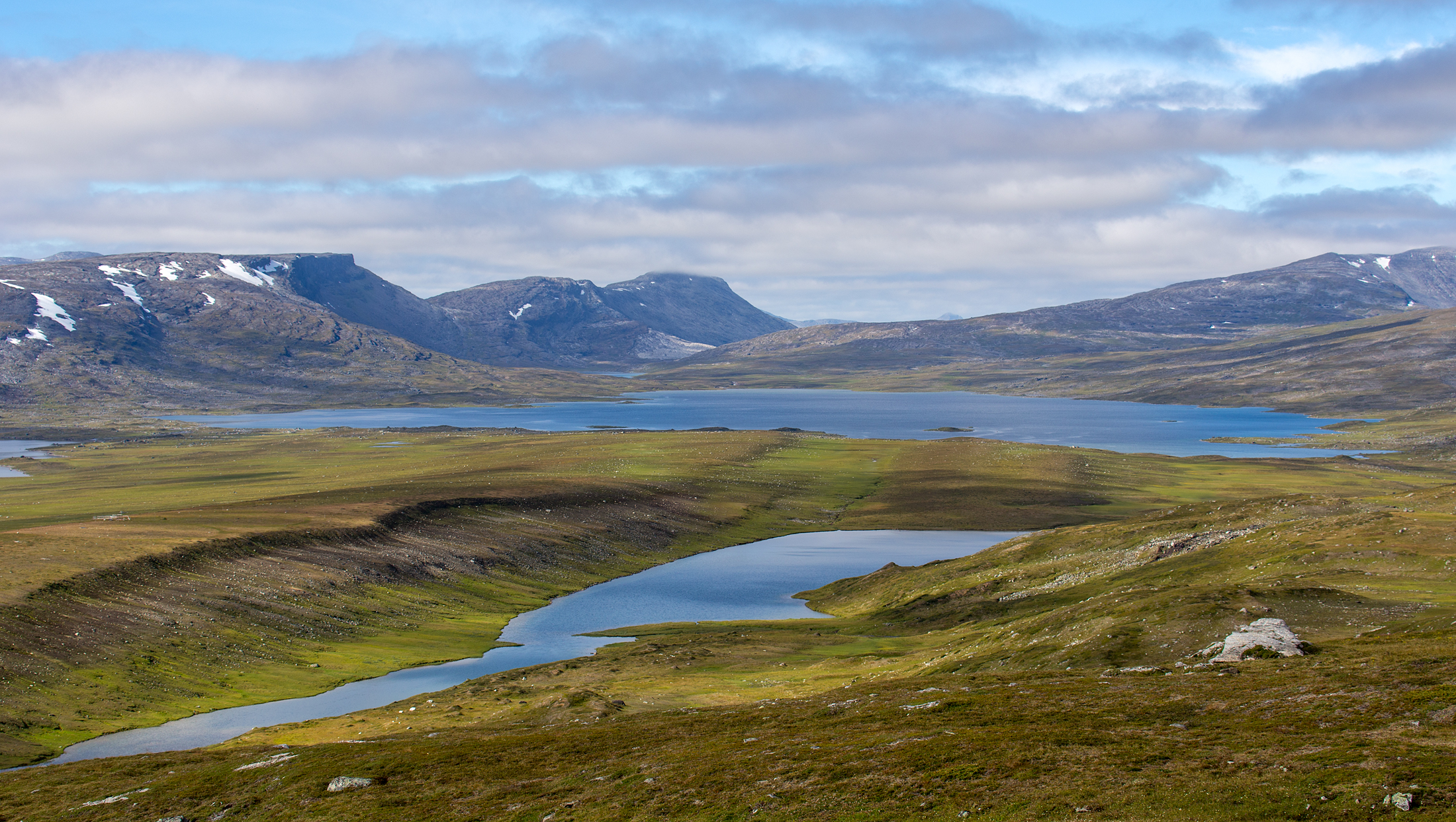 Gålokjávrásj längst ner och Gálbejávrre längre bort. Till vänster drumlinen Gålokgielas.